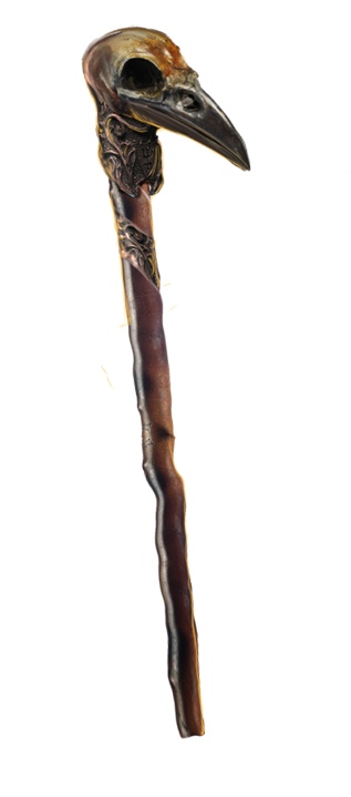 Wisemna mágikus botja